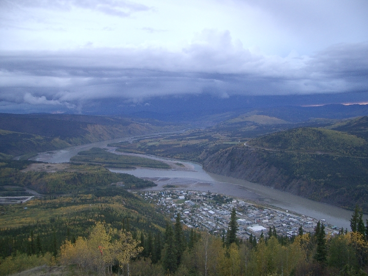 Yukon, Blick vom Midnight Dome auf Dawson City und den Yukon